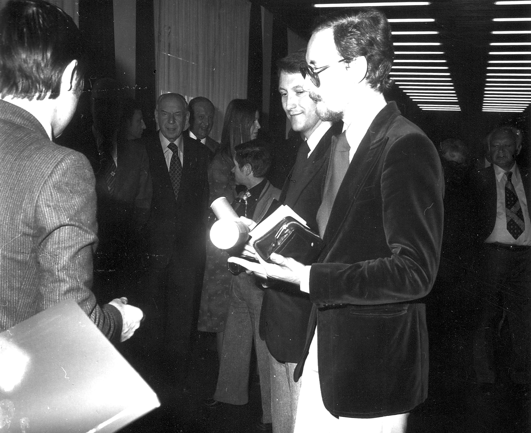 Verleihung der Goldenen Pelzmotte an Gerd Kursawe Rauchwarenhändler, Frankfurt am Main), Hans Quaet-Faslem (Gewerbeoberlehrer in Hamburg), Martin von Schachtmeyer (Kürschnermeister in Bad Oldesloe), 1976. Gerd Münchow („dienstältester“ Pelzdesign-Student), nimmt für den verhinderten Hans-Quaet-Faslemihn die Auszeichnung entgegen. Dahinter Martin von Schachtmeyer. Der kleine Herr in der Mitte: Pressefotograf „Mickey“ Bohnacker, Frankfurt am Main.